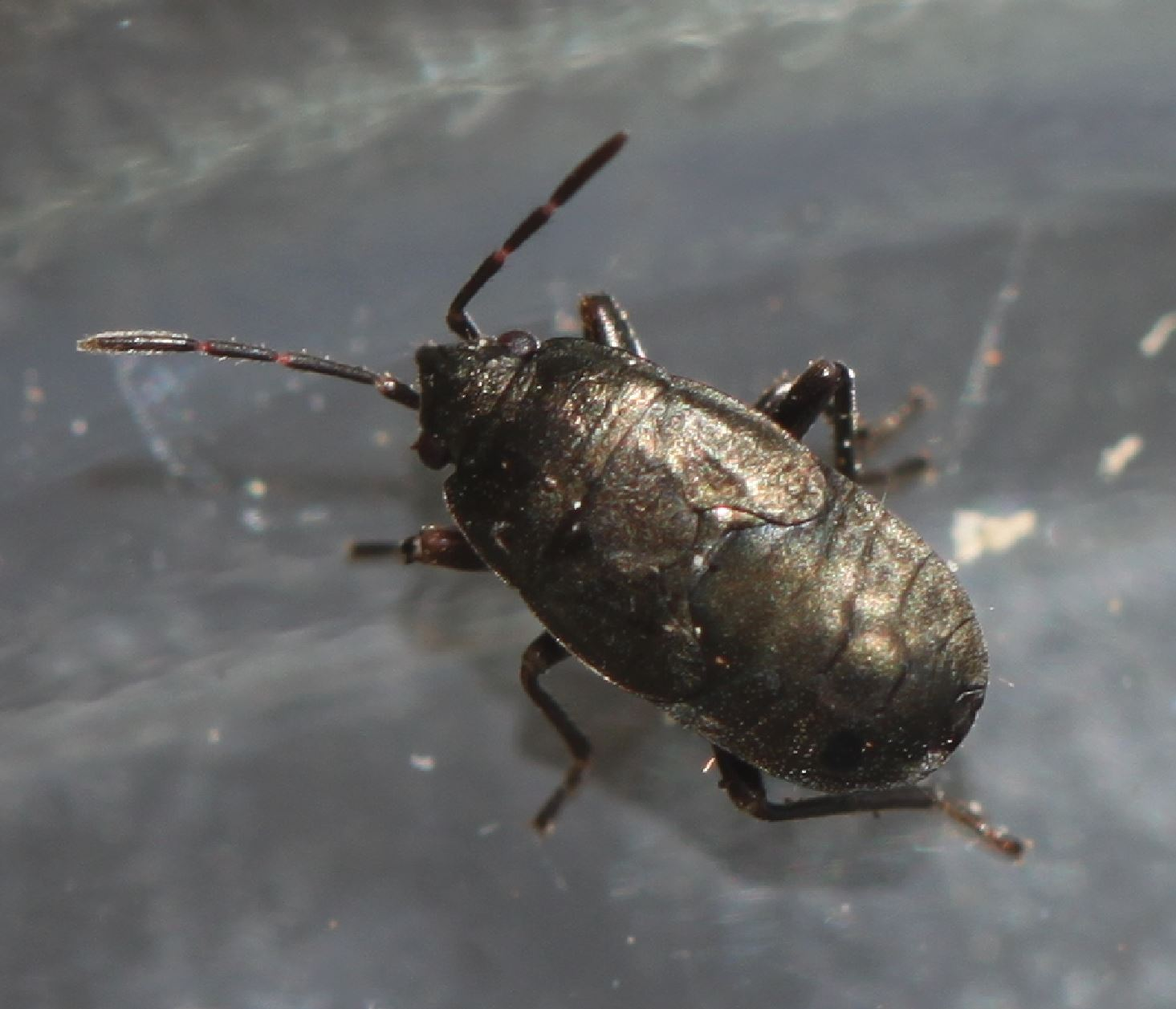 Nymphe vermutlich von Megalonotus dilatatus, am 22. Juli 2017 in der Schwetzinger Hardt